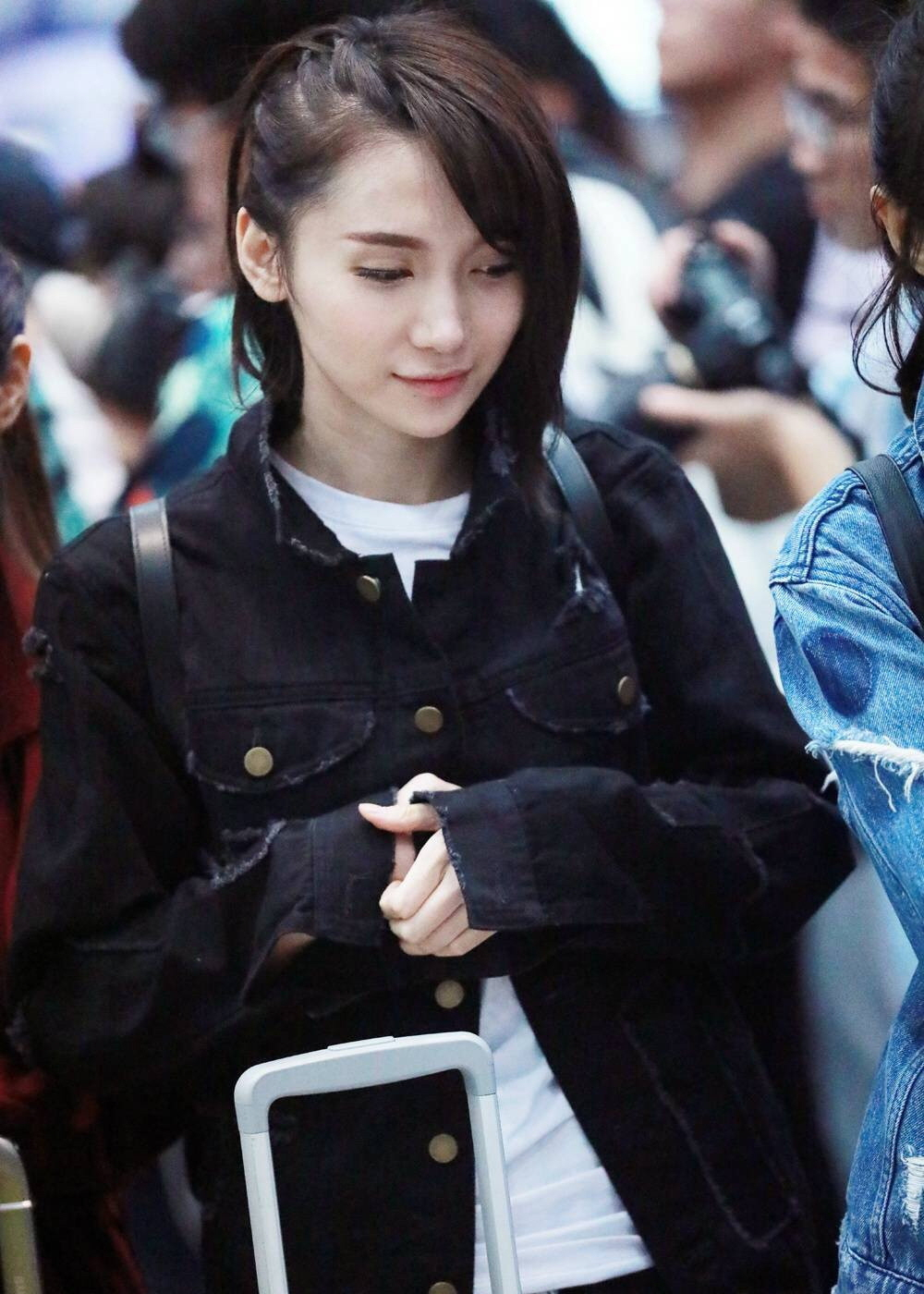 撩我不要停！(陆婷)